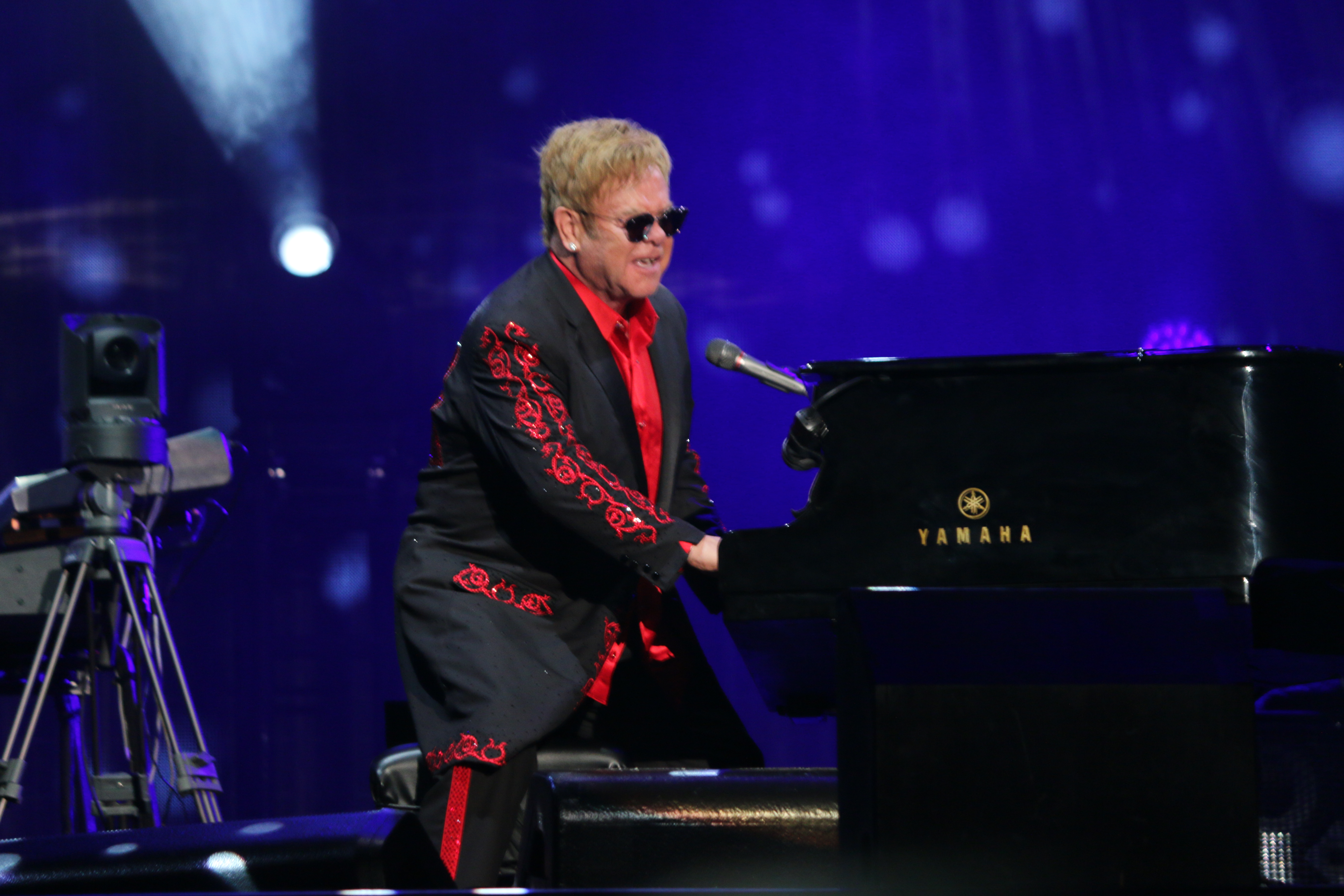 ELTON JOHN AND HIS BAND in EXPO 2016 ANTALYA CONCERT